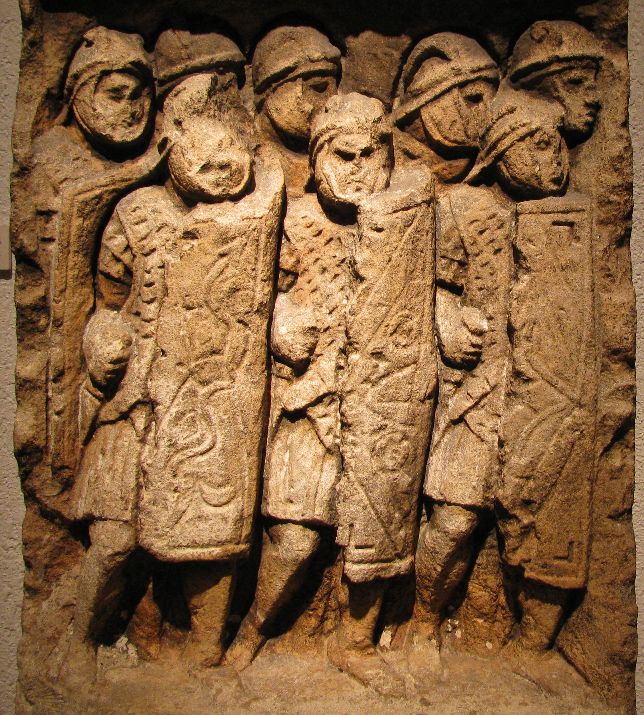 Stèle trouvée à Glanum, groupe de légionnaires en formation - Exposé au musée gallo-romain de Fourvière - Lyon